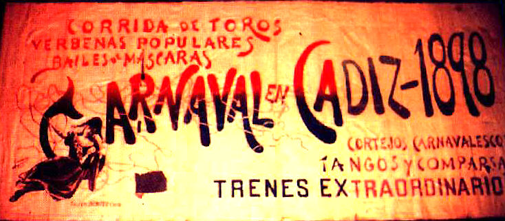 Cartel anunciador del carnaval de Cádiz de 1898